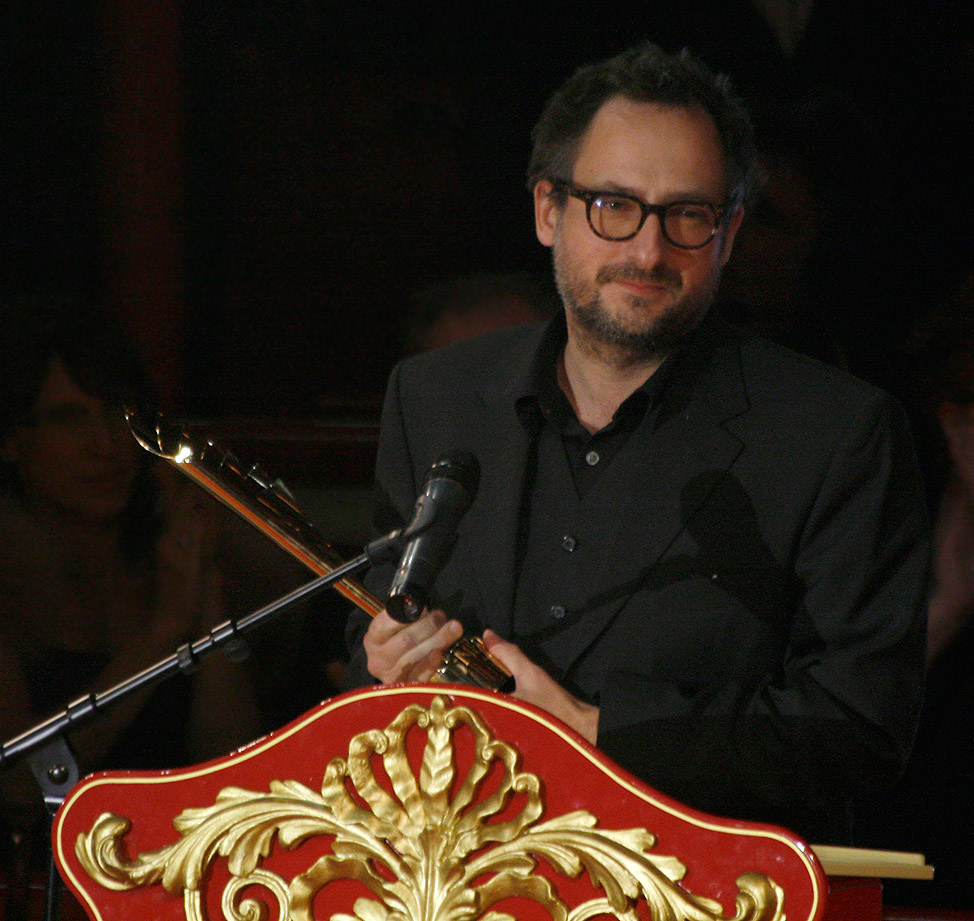 Roland Schimmelpfennig mit dem Autorenpreis für das beste Stück während der Verleihung des Nestroy-Theaterpreises 2009 (Circus Roncalli auf dem Wiener Rathausplatz).